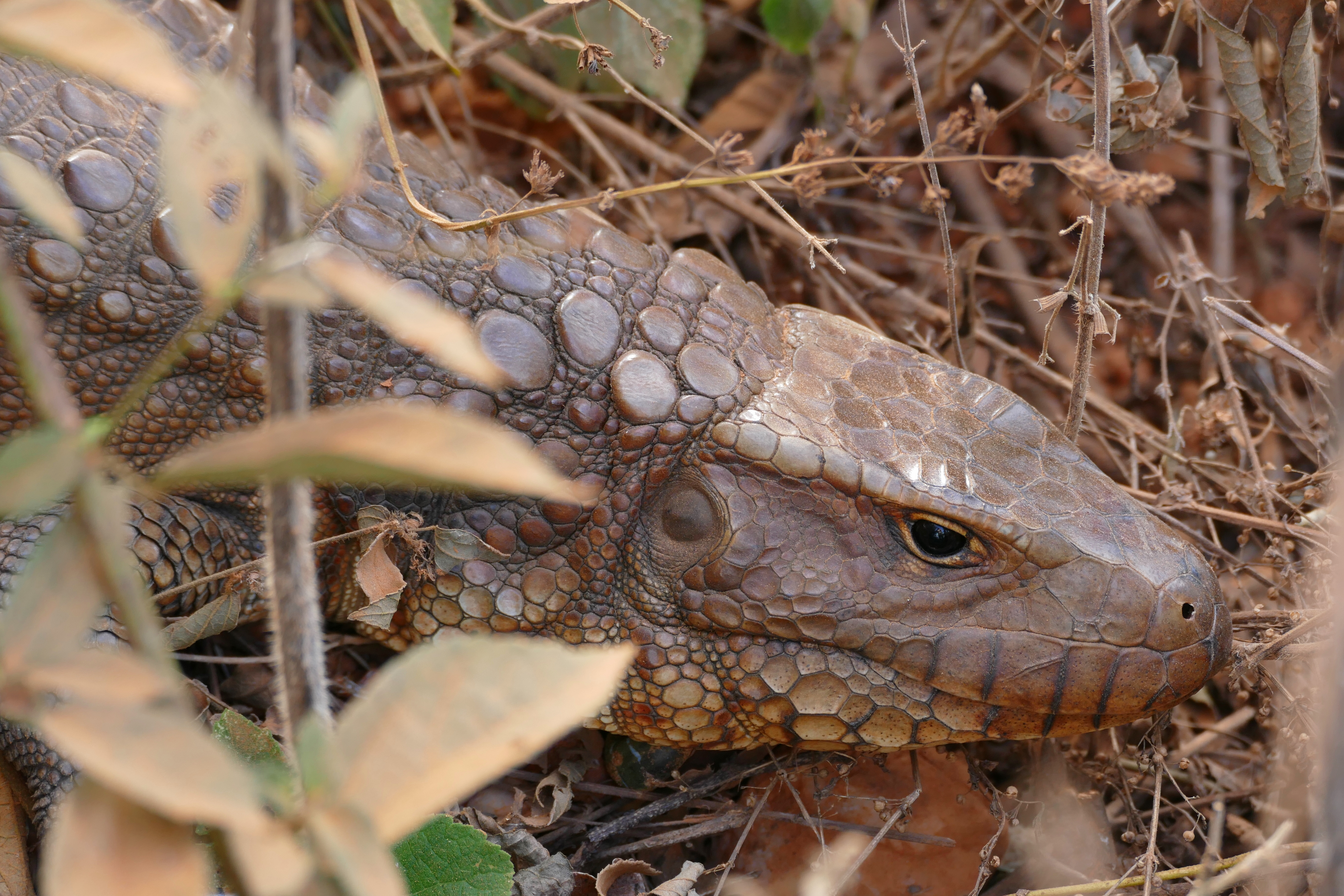 Transpantaneira, Poconé, Mato Grosso, BRAZIL